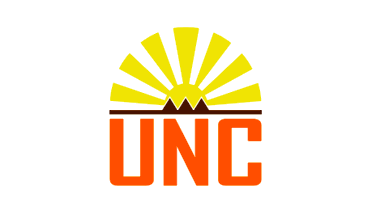 Logo des UNC